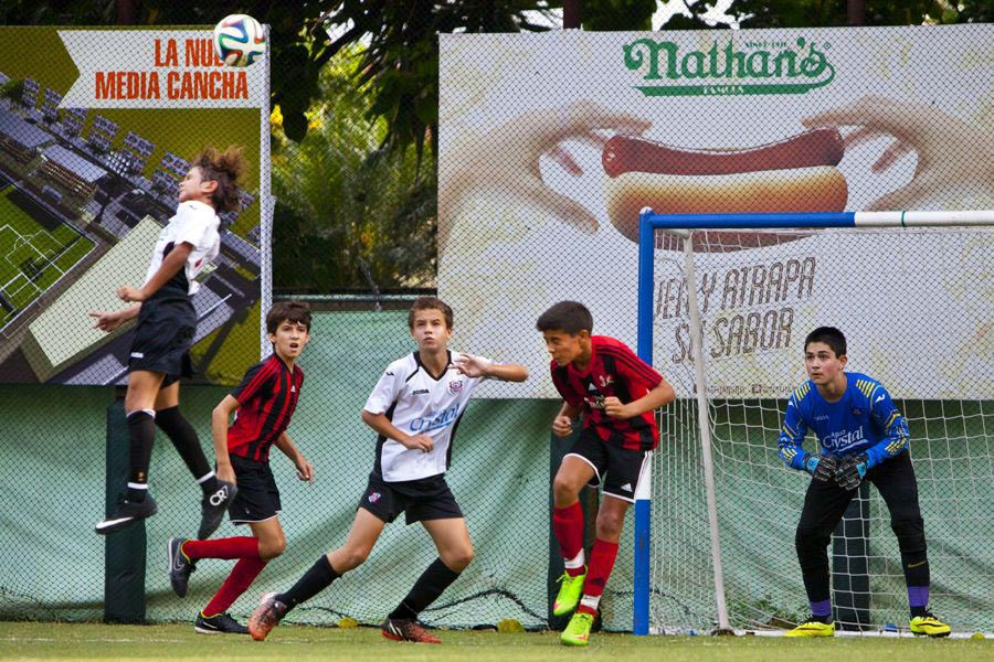 Final de la copa del Banco Popular de Futbol de la Media Cancha entre el Milan FC y Union FC. Los muchachos de la Milan Junior Camp, RD se llevaron la copa al ganar 3 a 2 en un reñido y emocinante partido, celebrado en La Media Cancha de Santo Domingo.